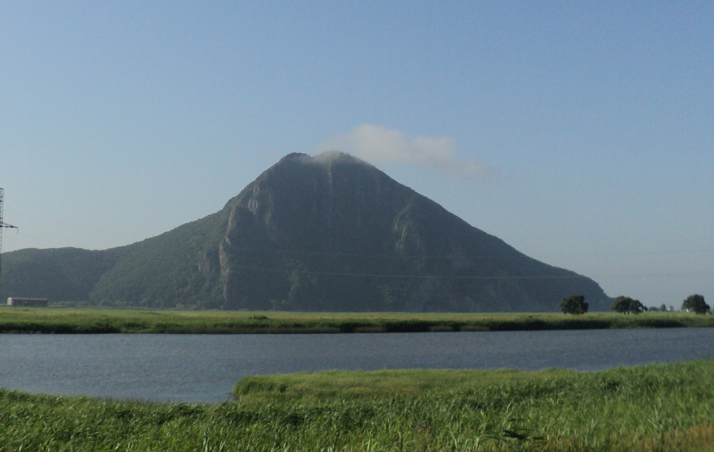 «Монблан» Находки - Гора Сестра